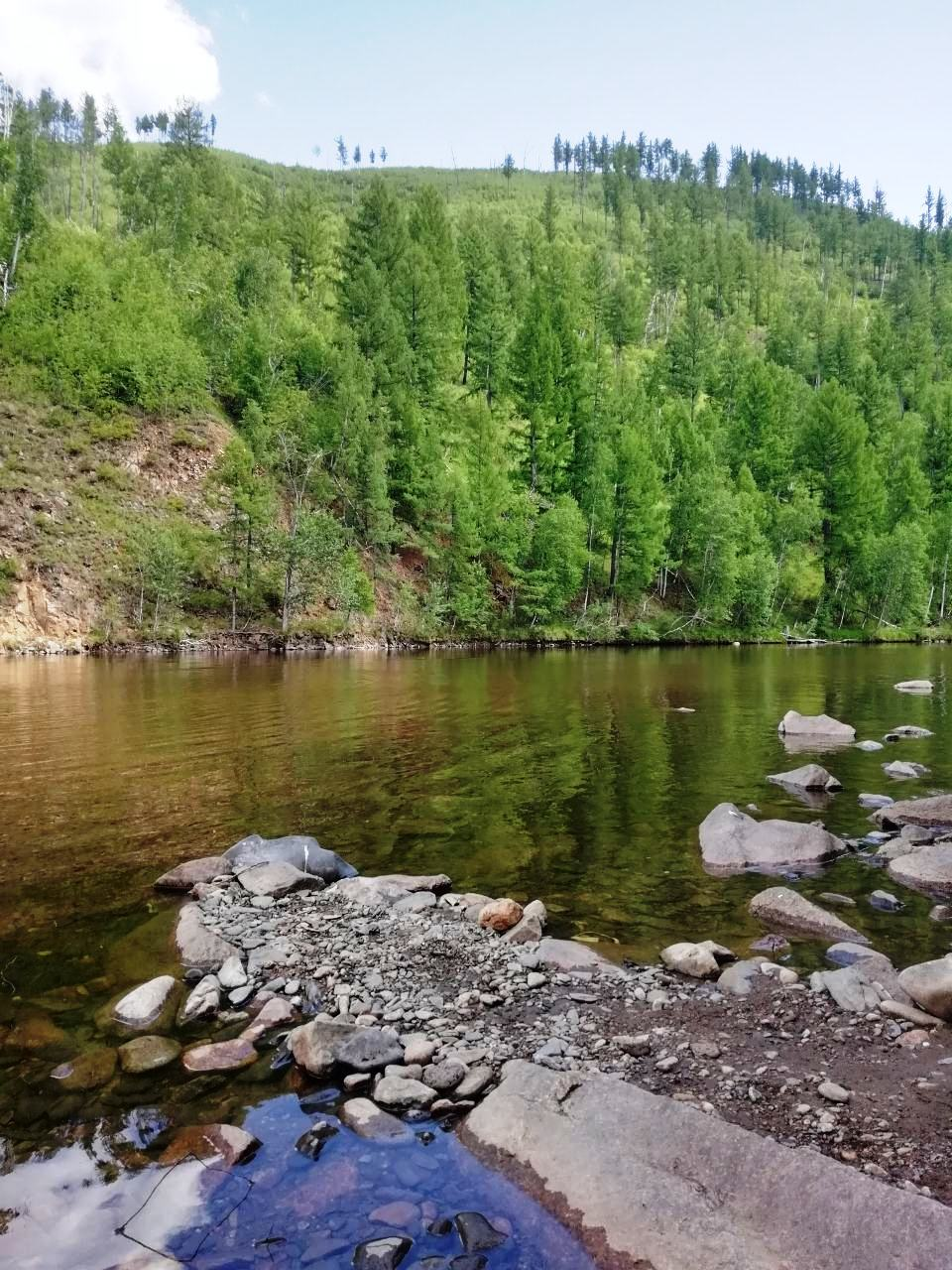 Река Хамней (Бурятия)